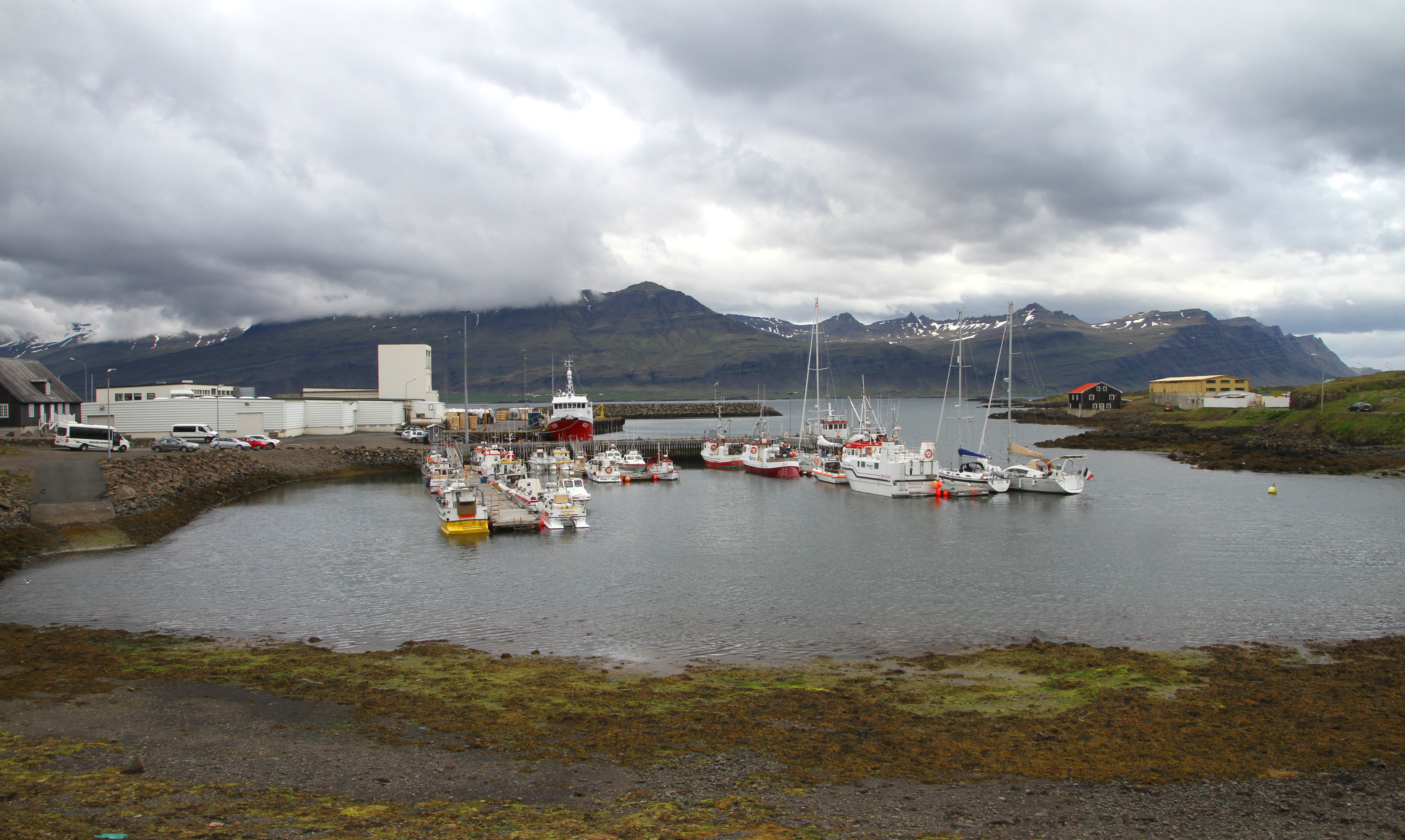 Djúpivogur in Island